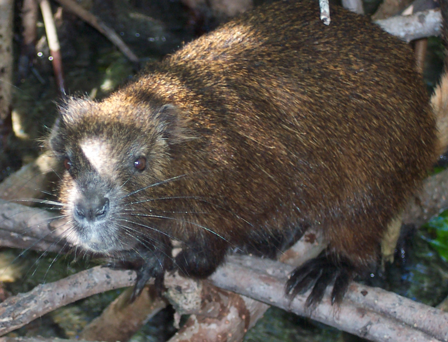 Demarest's_Hutia, Capromys pilorides near Morón, Cuba